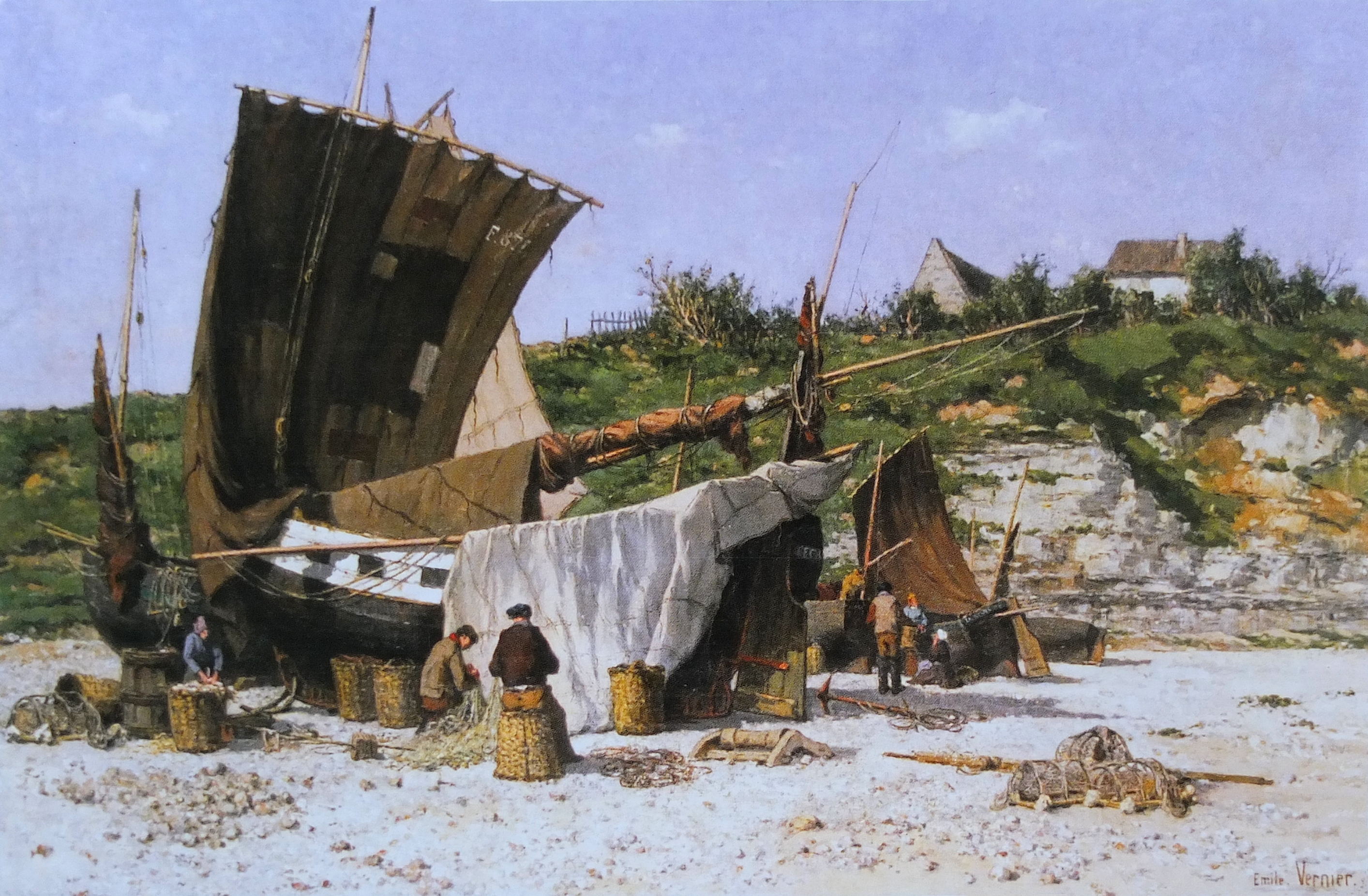 Bateau à sec sur la plage d'Yport, huile sur toile d’Émile Vernier, 1877. 100 x 160 cm. Musée des beaux-Arts de Besançon.